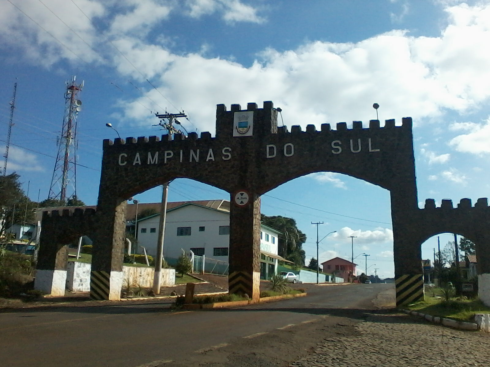 Portal de entrada de Campinas do Sul